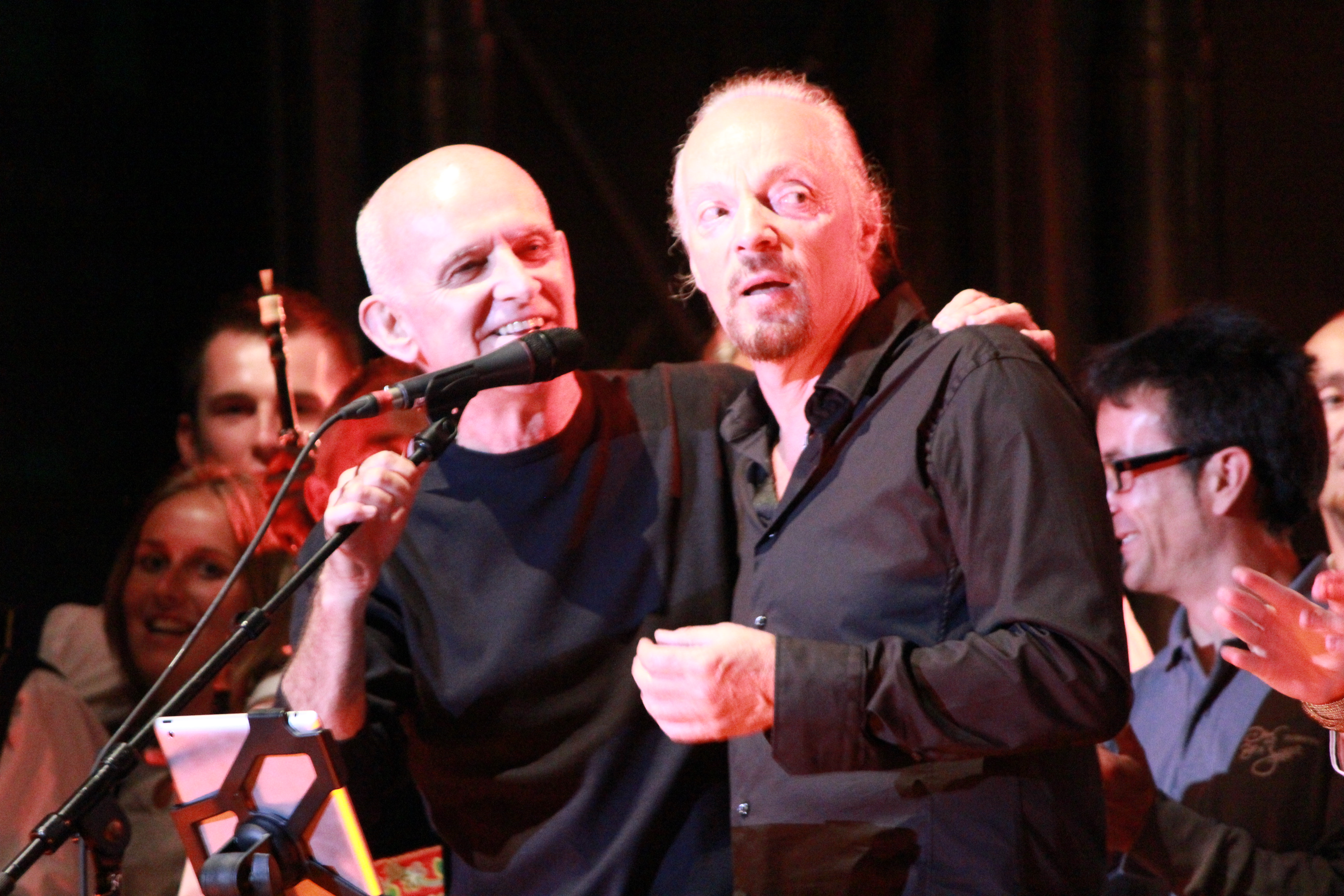 Dan Ar Braz et Alan Stivell lors de son concert inaugural de la tournée liée à la promotion de l'album Celebration, lors du Festival Interceltique de Lorient 2012.